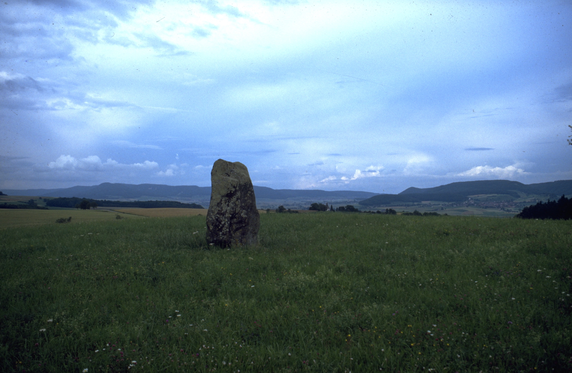 Landkreis Waldshut – Menhir von Degernau (Wutöschingen).